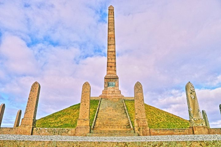 Haraldstøtten - Haraldshaugen - Haugesund - HDR